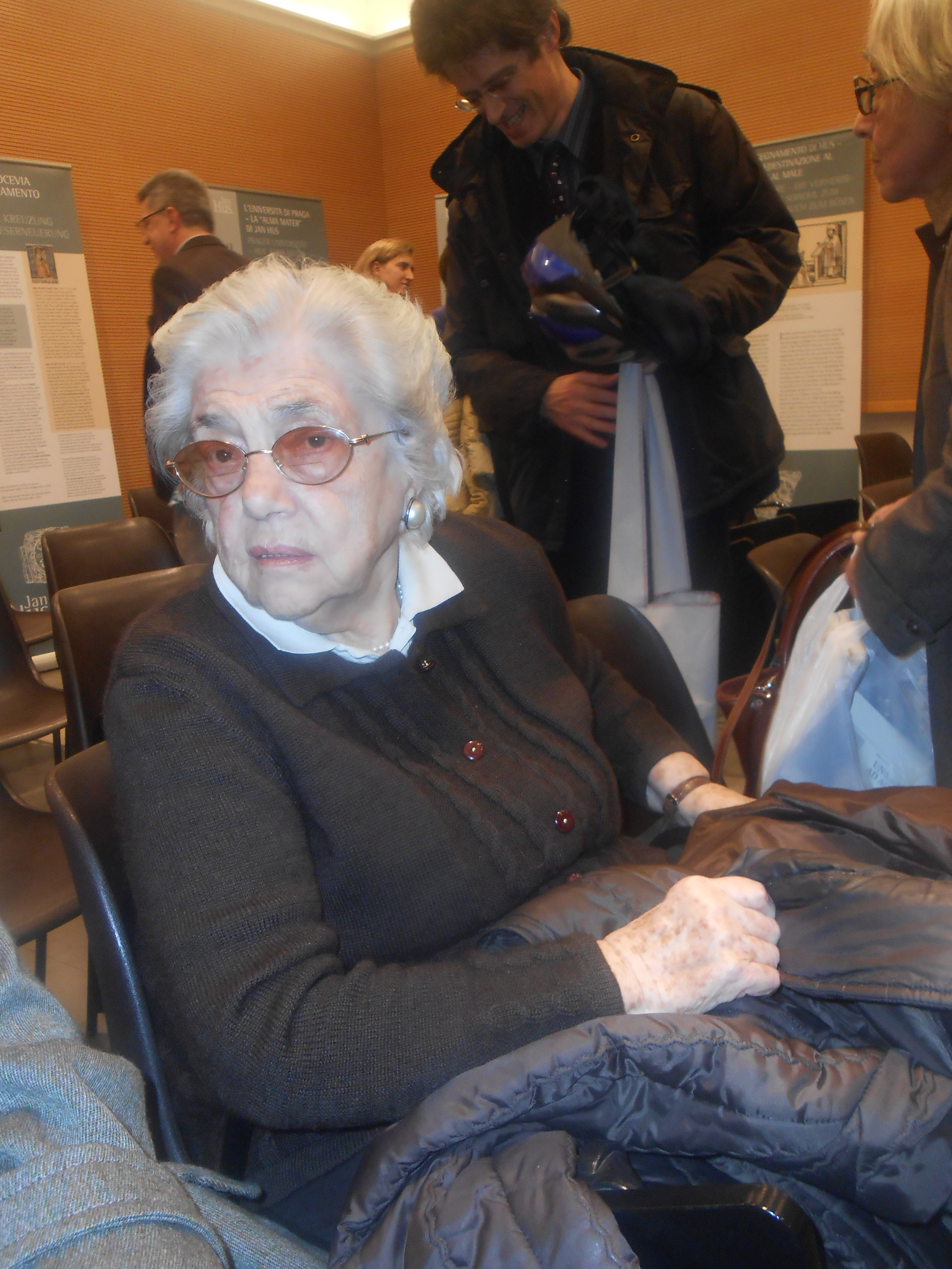 Goti Bauer 18-02-2014 alla presentazione del libro della sua amica Aeianna Szorenyi